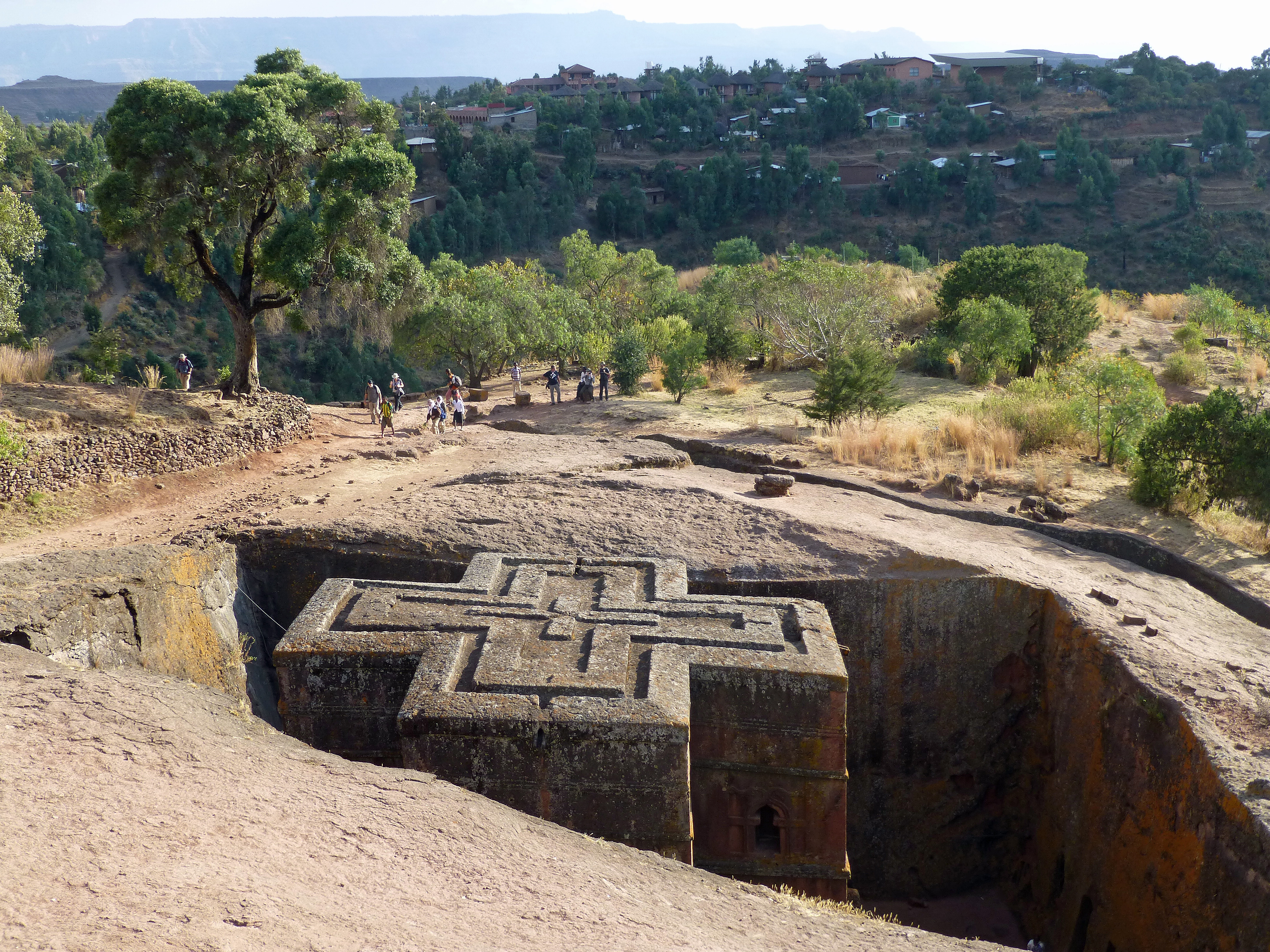 Eglise Saint-Georges à Lalibela (Ethiopie)